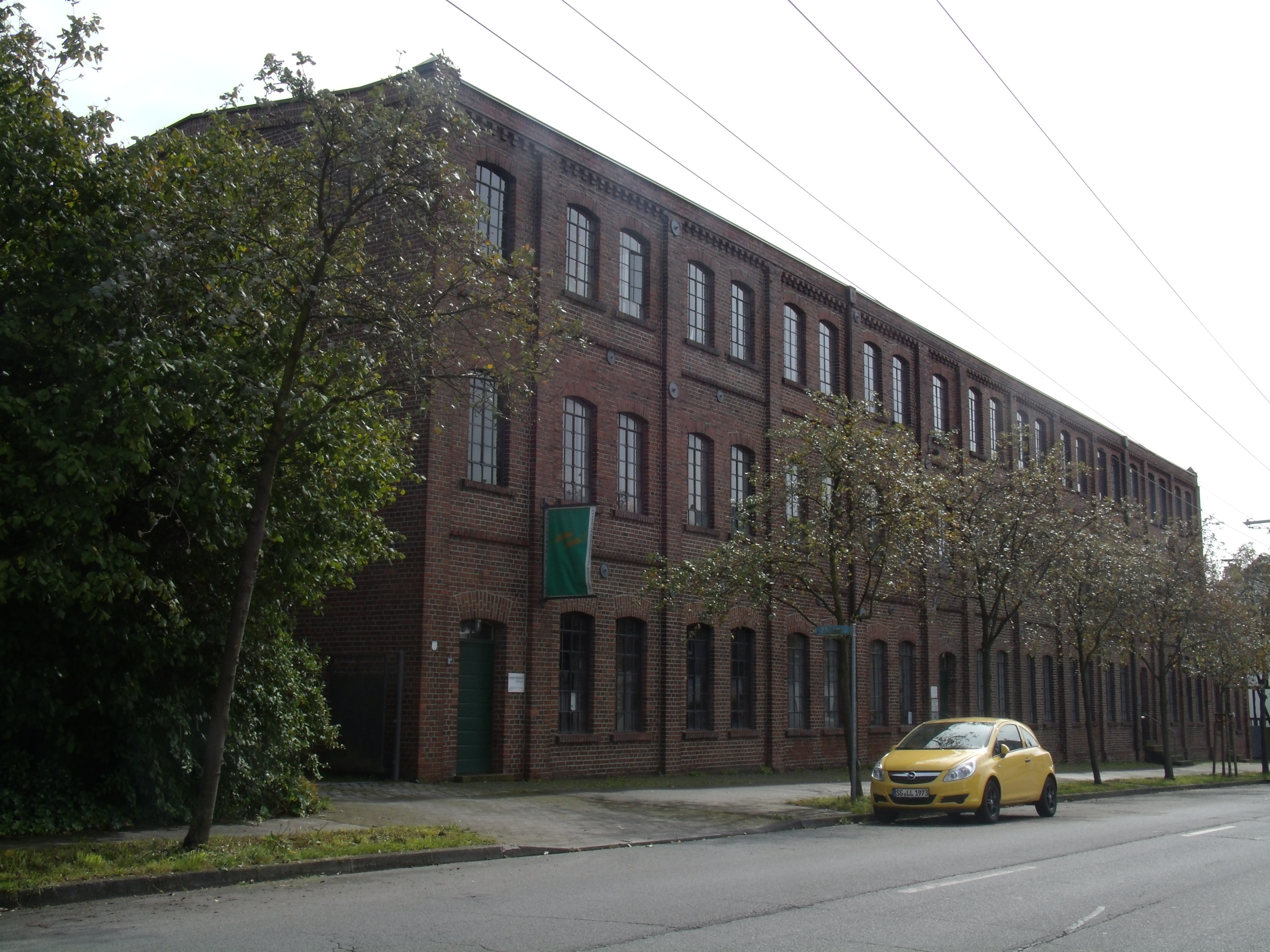 Baudenkmal ehemalige Dampfschleiferei „Loos’n Maschinn“